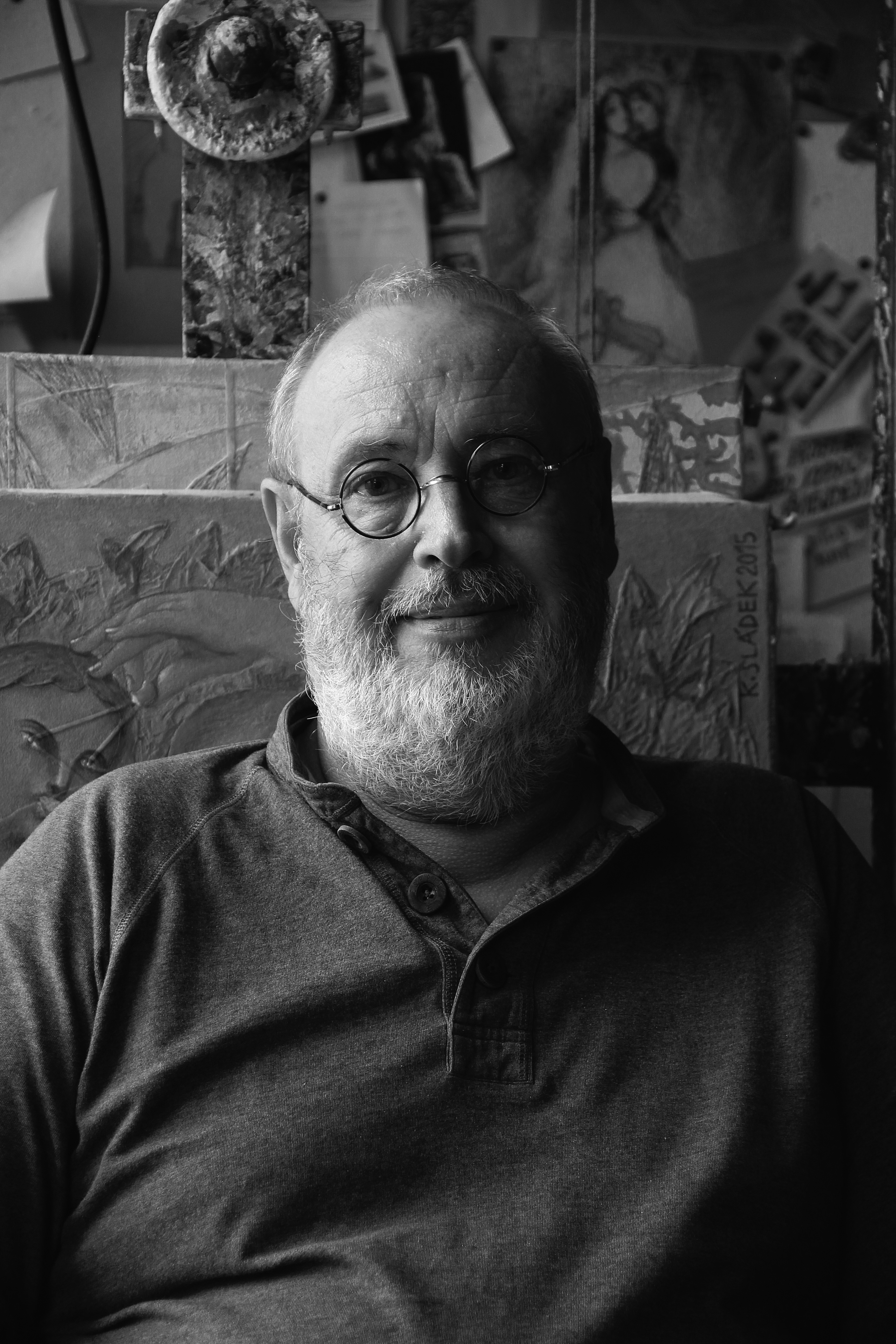 Karel Sládek (malíř), portrét z roku 2016